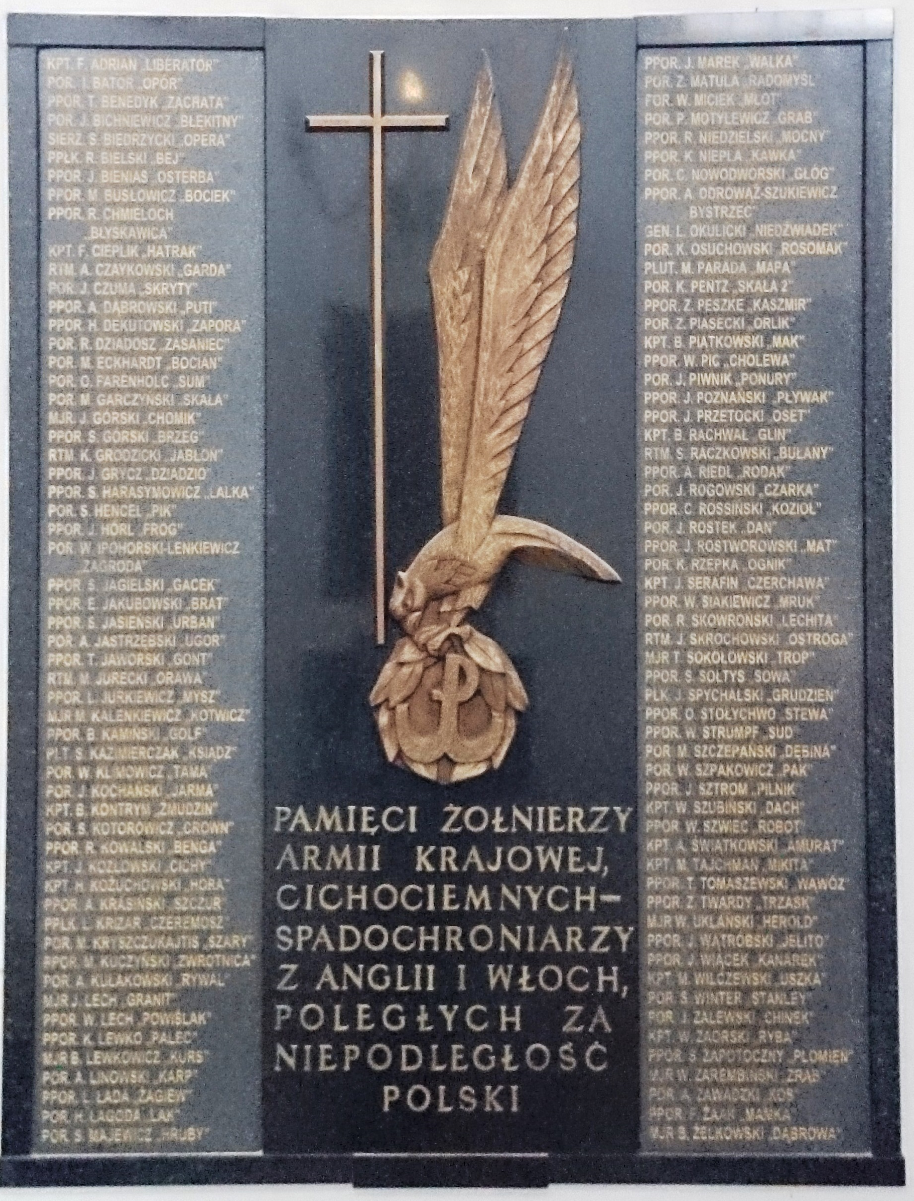 Tablica poświęcona 108 poległym cichociemnym w lewej nawie kościoła św. Jacka przy ul. Freta w Warszawie